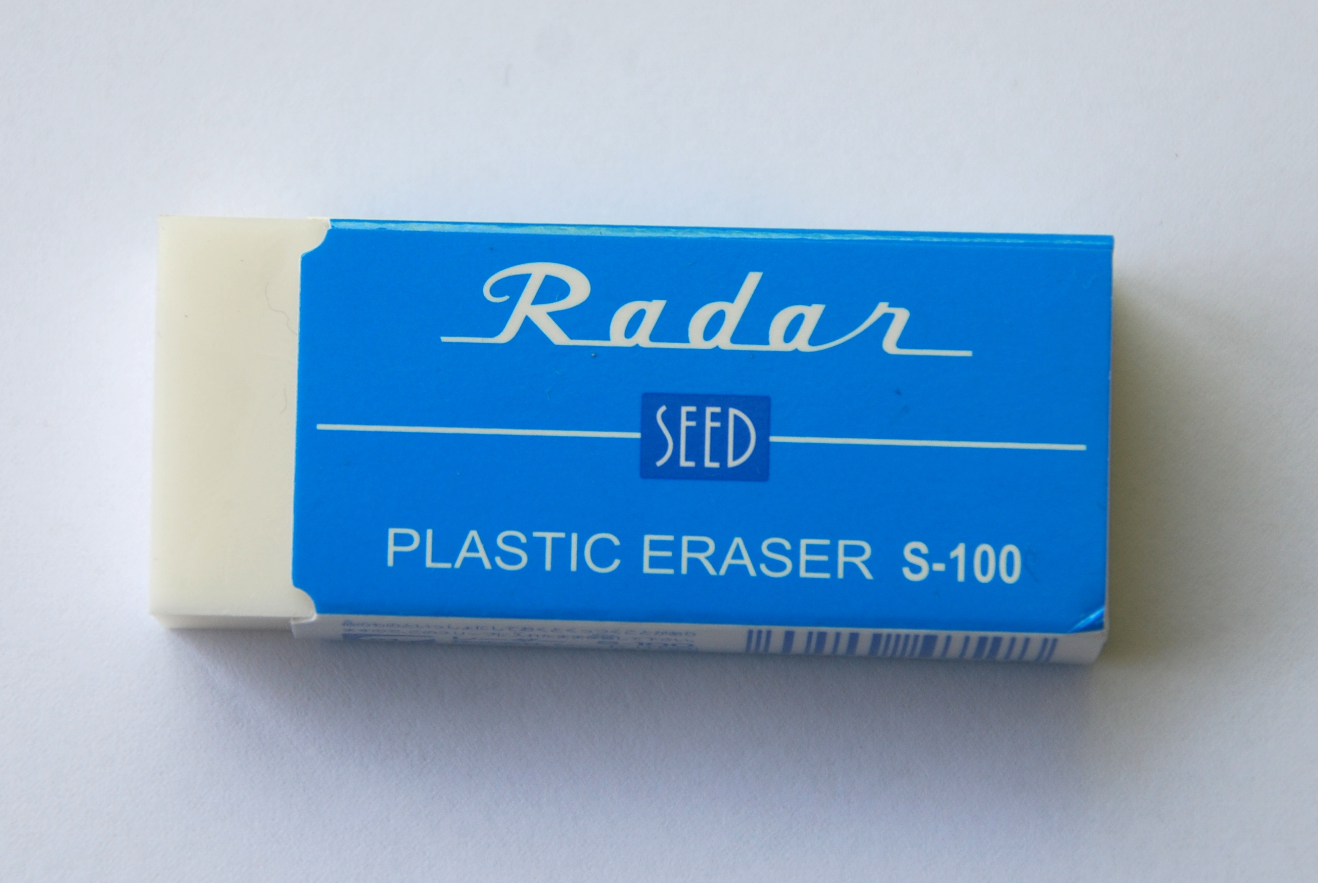 レーダー消しゴム（S-100）。上からの写真。